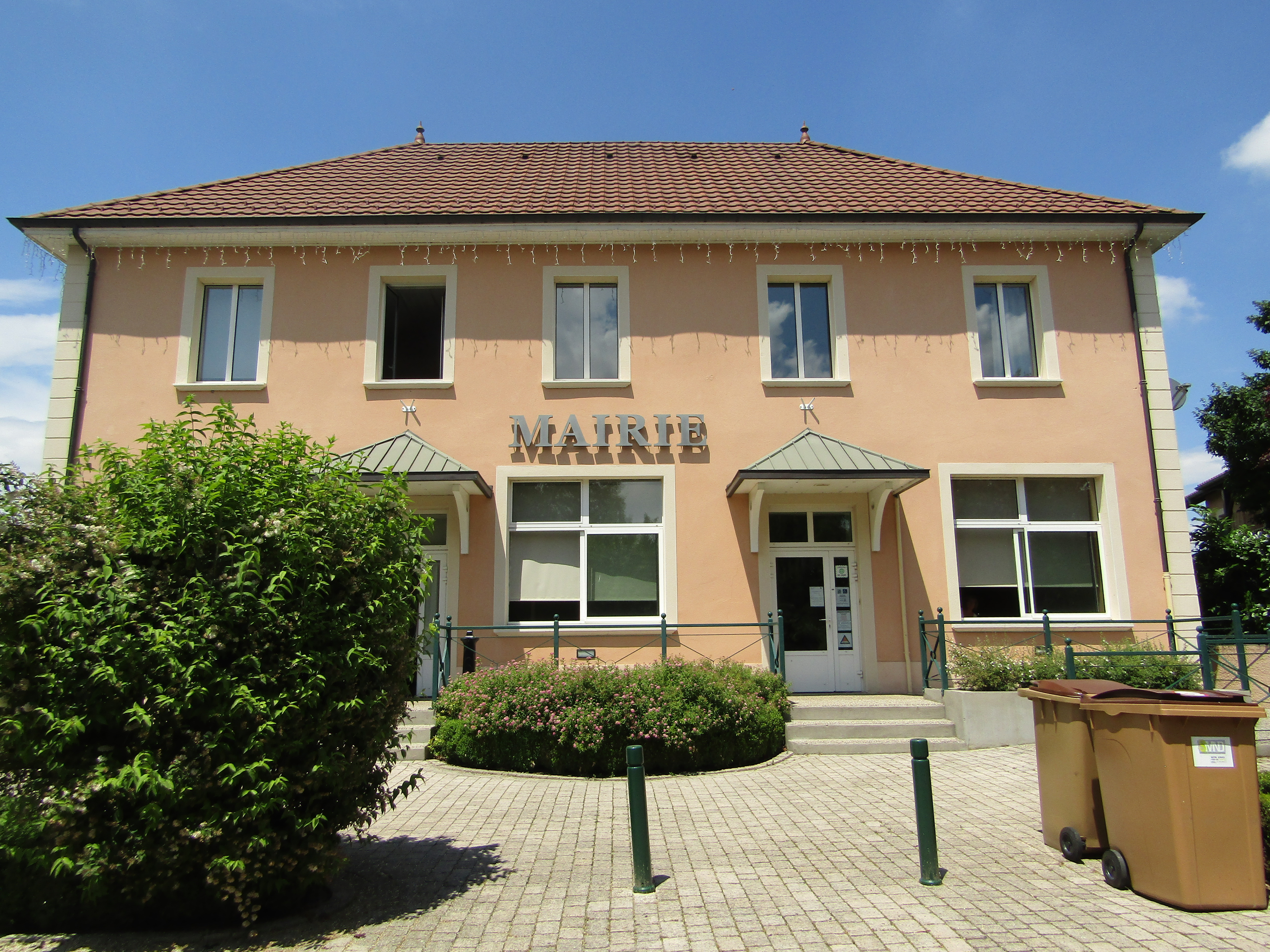 Mairie de Sérézin-de-la-Tour